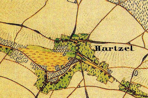 Preußische Kartenaufnahme 1846 -Uraufnahme- (Gangelt)